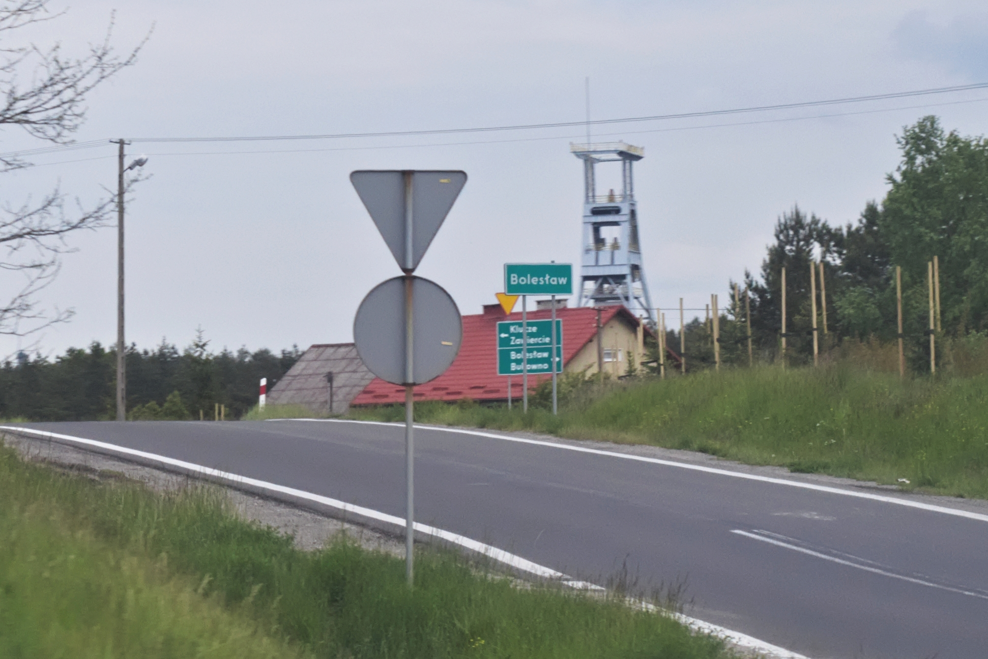 droga do Bolesławia, widoczna wieża wyciągowa szybu Dąbrówka kopalni Olkusz-Pomorzany w Bolesławiu, widok z okna busa